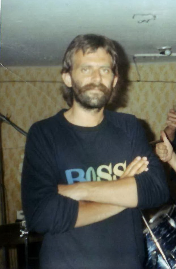 A zenekar tagjairól készült felvétel